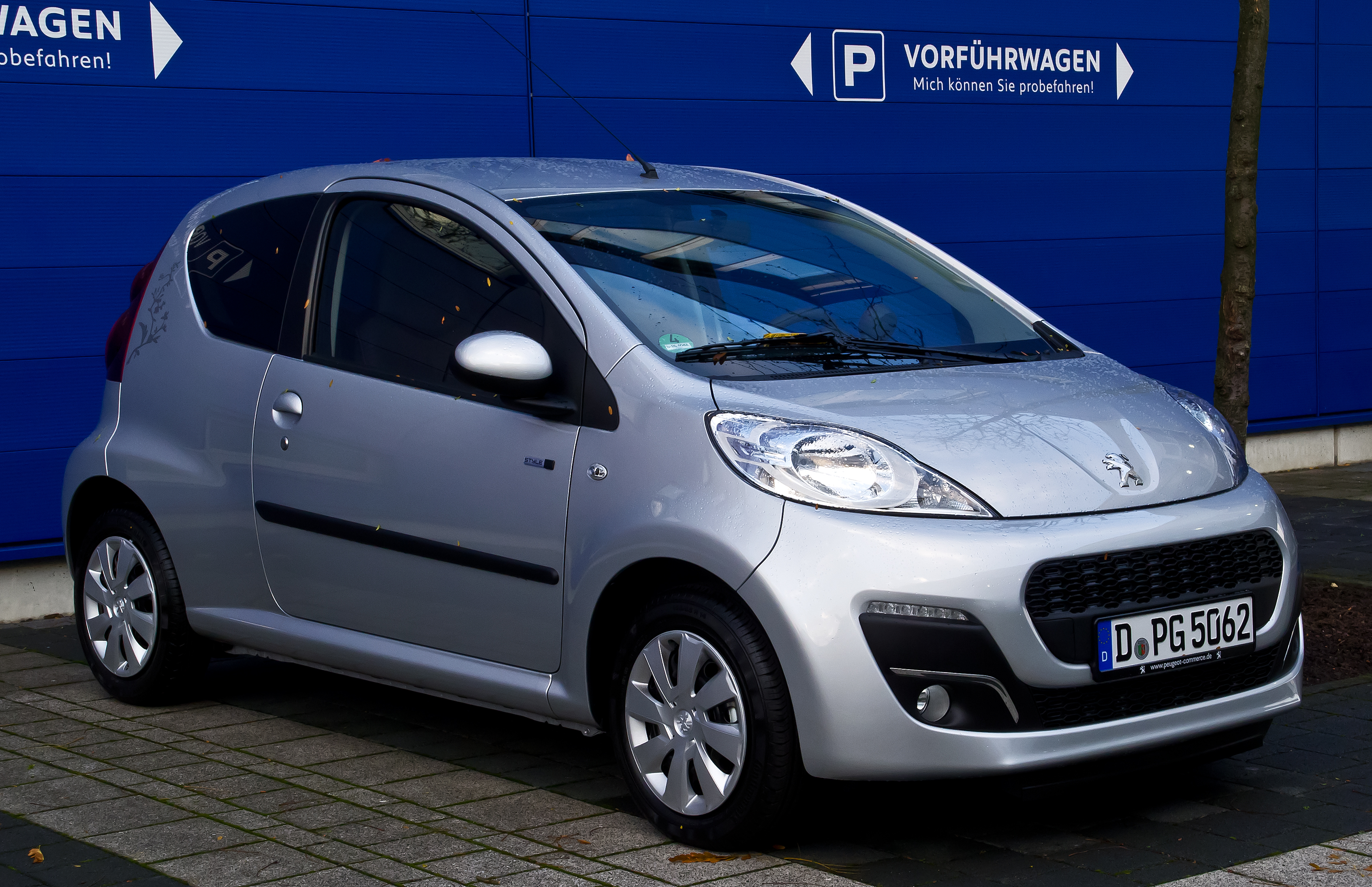 Peugeot 107 68 Style (2. Facelift)